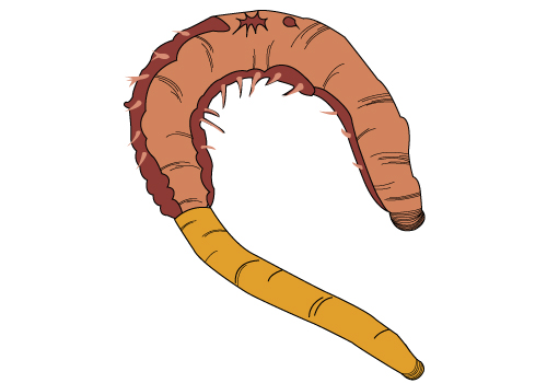 Illustrasjon av Fjæremark.